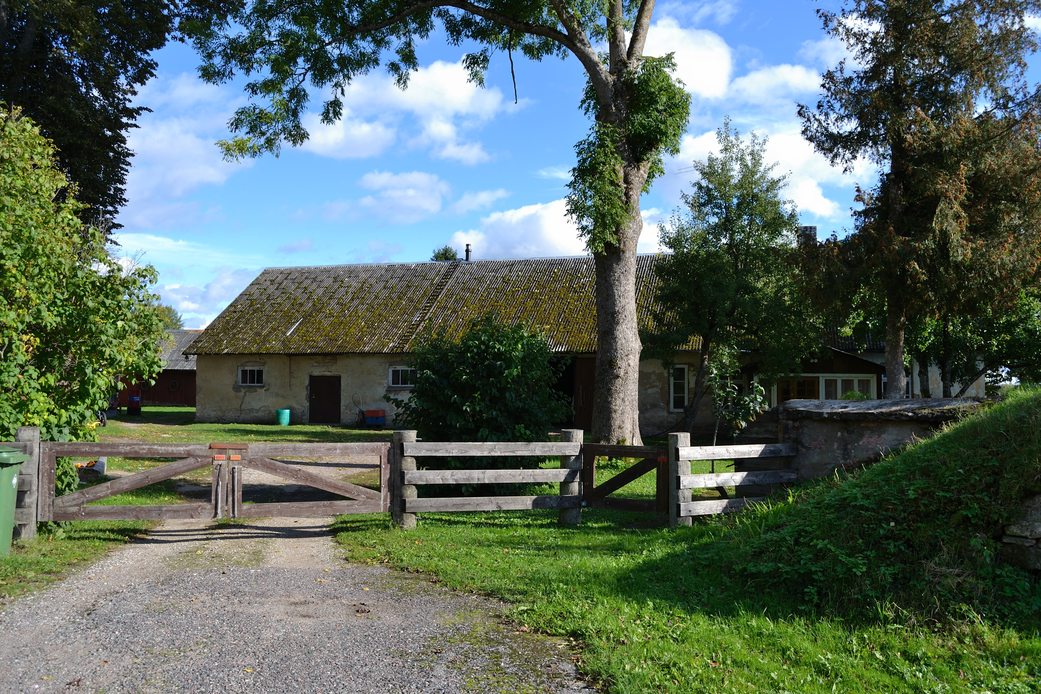 Juuru mõisa ait-elamu